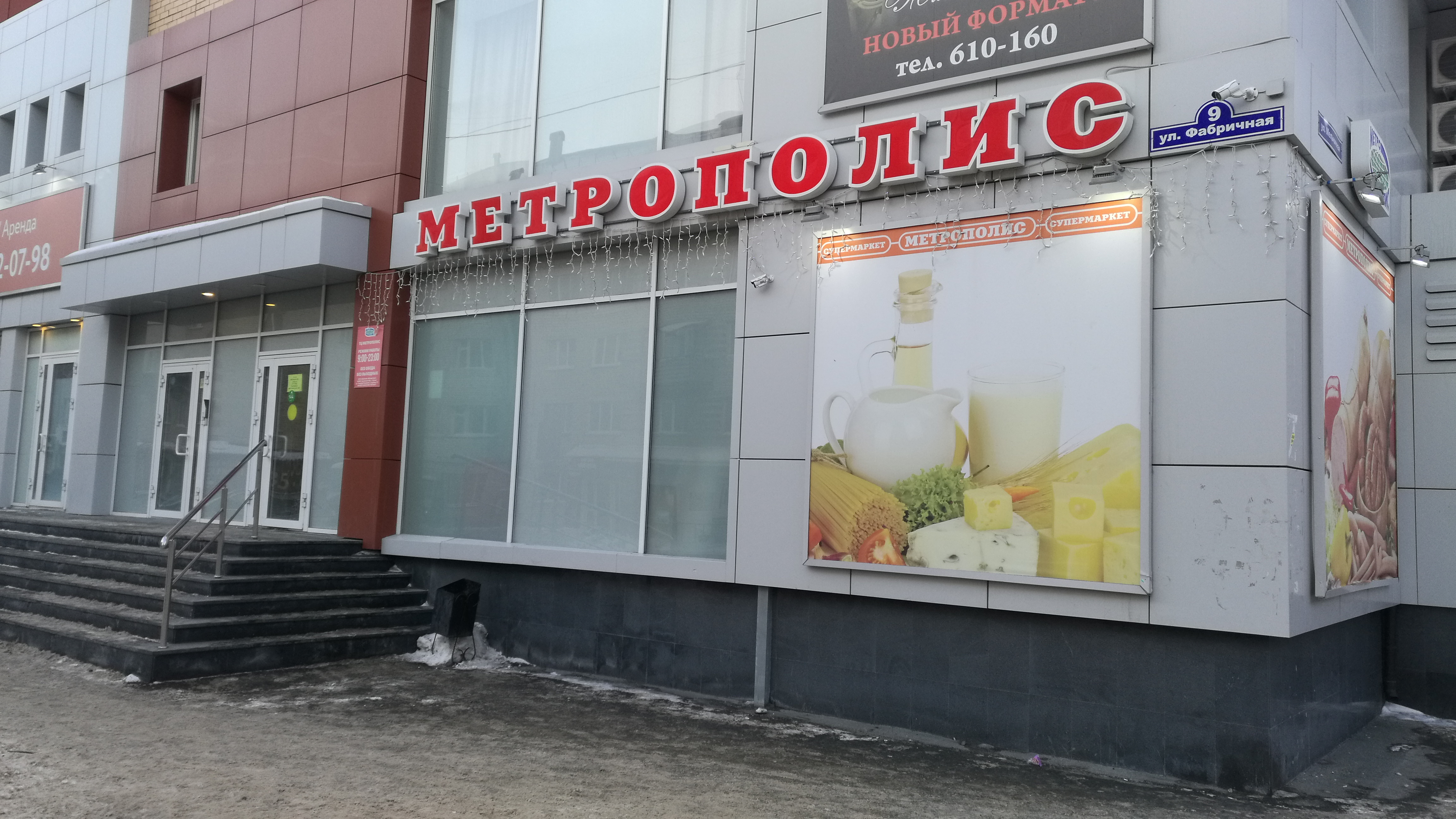 Loĝdomo sur strato Fabriĉnaja 9. Tjumeno, Rusio.